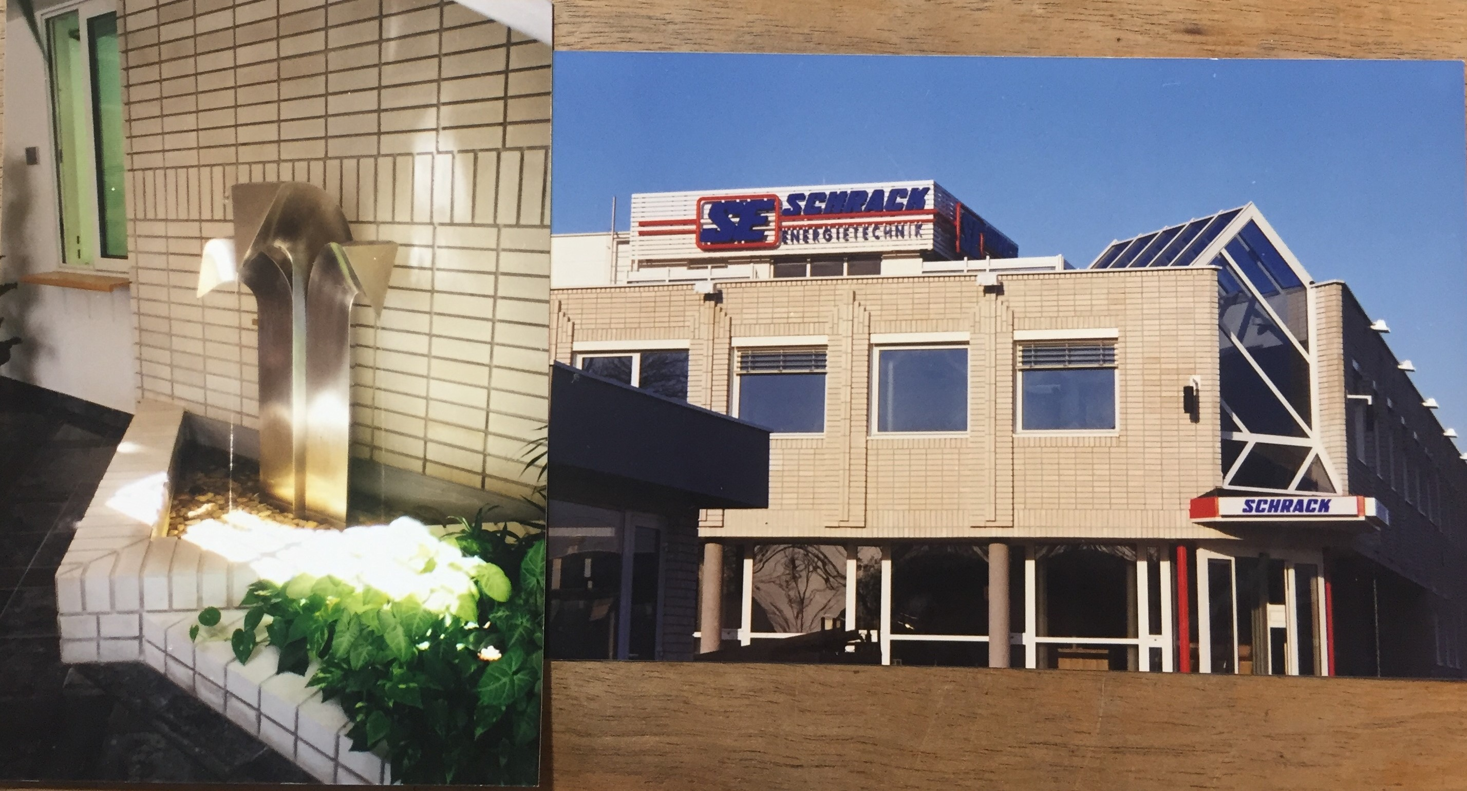 Schrack Energietechnik épülete, Budapest, Vidor u. 5, 1172